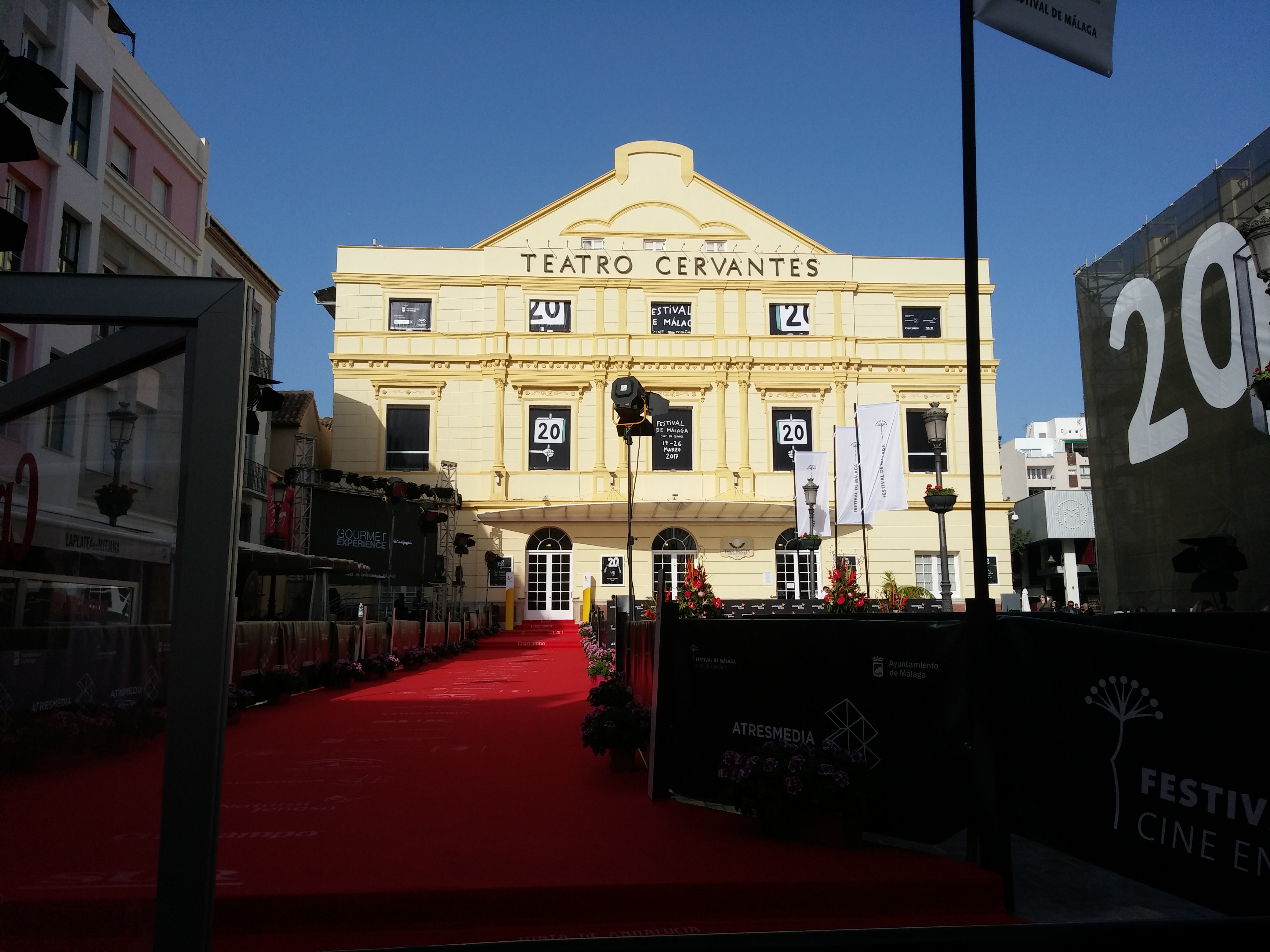 Das Teatro Cervantes in Malaga im März 2017, anässlich des 20. Festival Cine Malaga